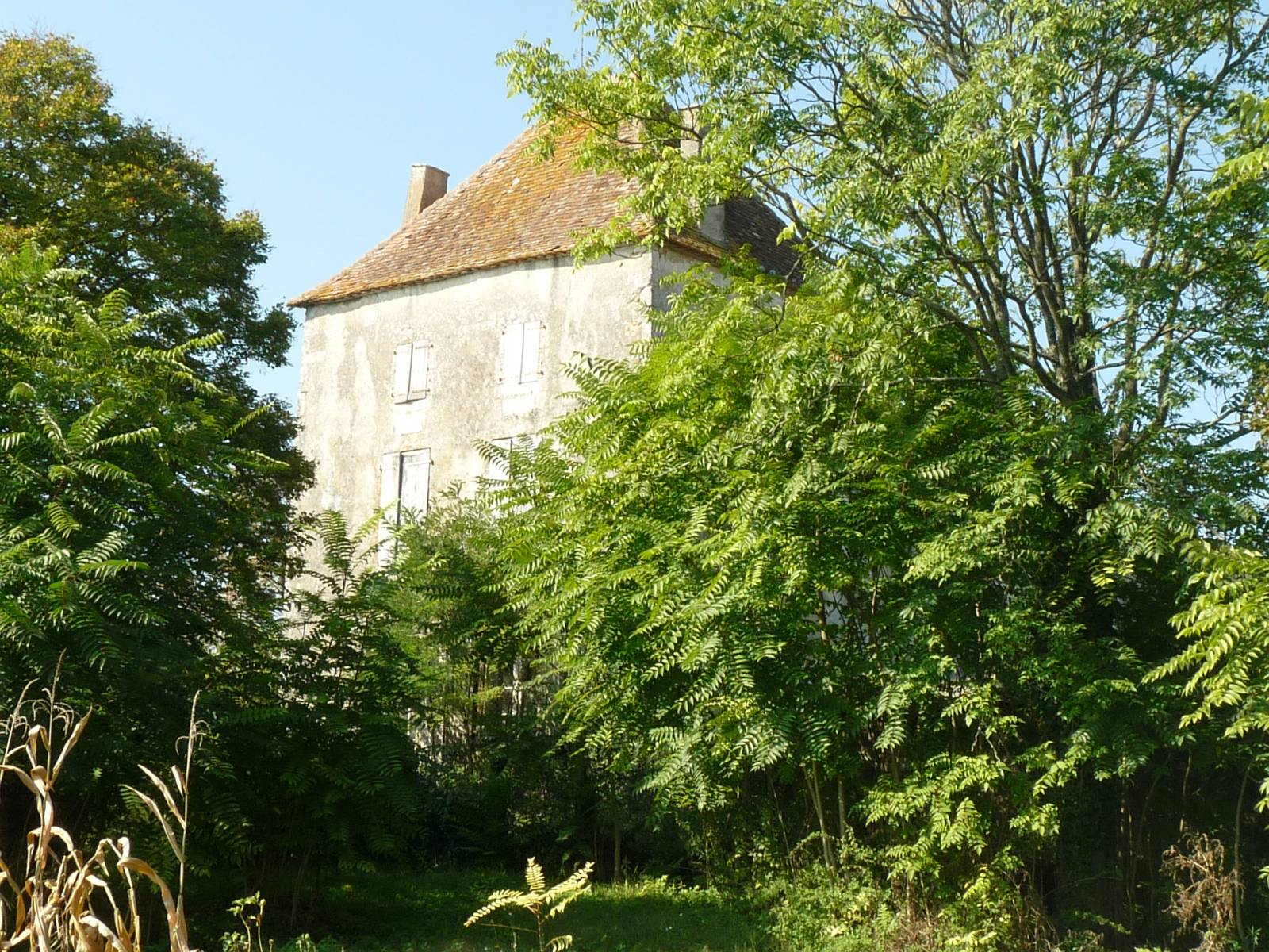 Le Haut Logis, manoir à Juillaguet (16), France